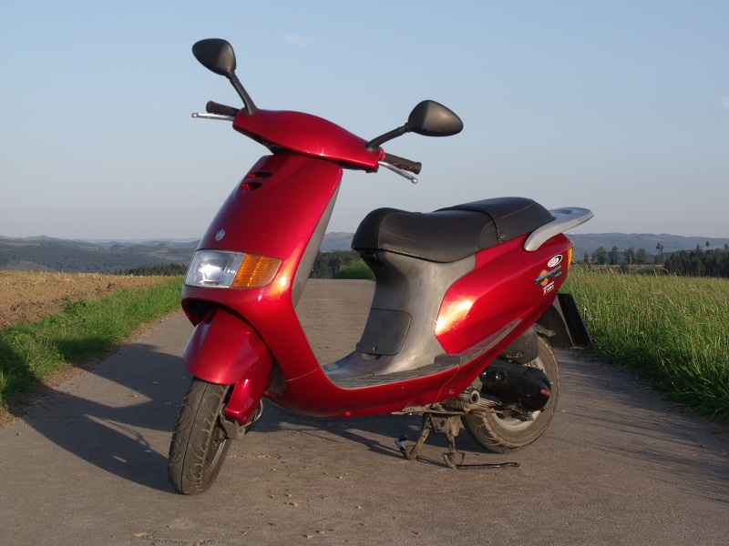 Foto meiner Sfera 125